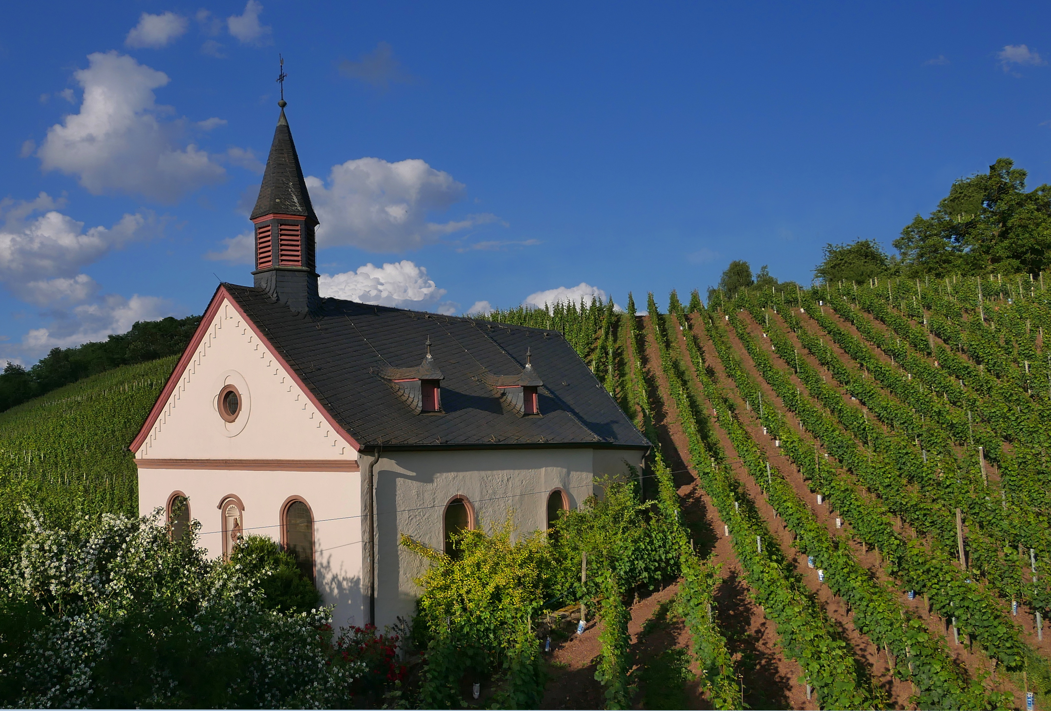 Ehemalige Kirche St- Germanus in Trier-Feyen